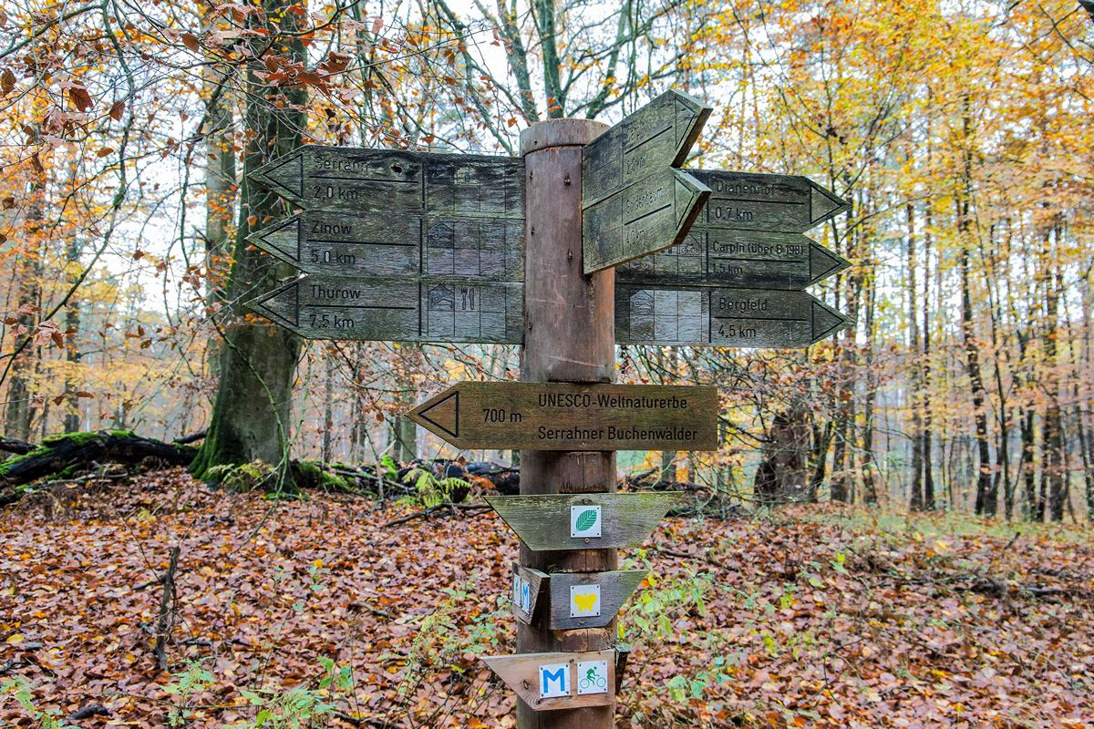 Wanderwegweiser bei Serrahn (Carpin) in Mecklenburg